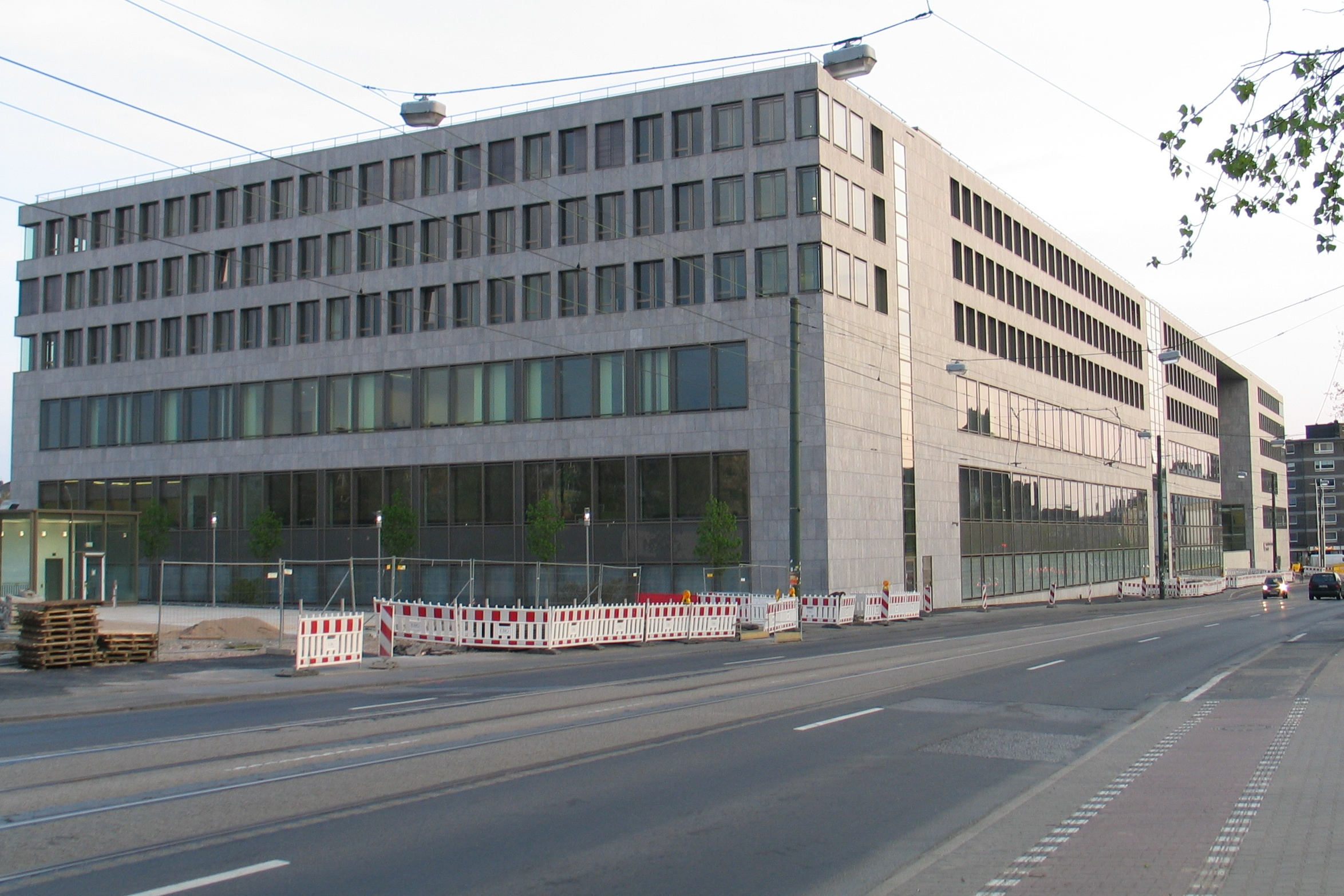 Land- und Amtsgericht Düsseldorf (neues Justizzentrum), Werdener Straße 1